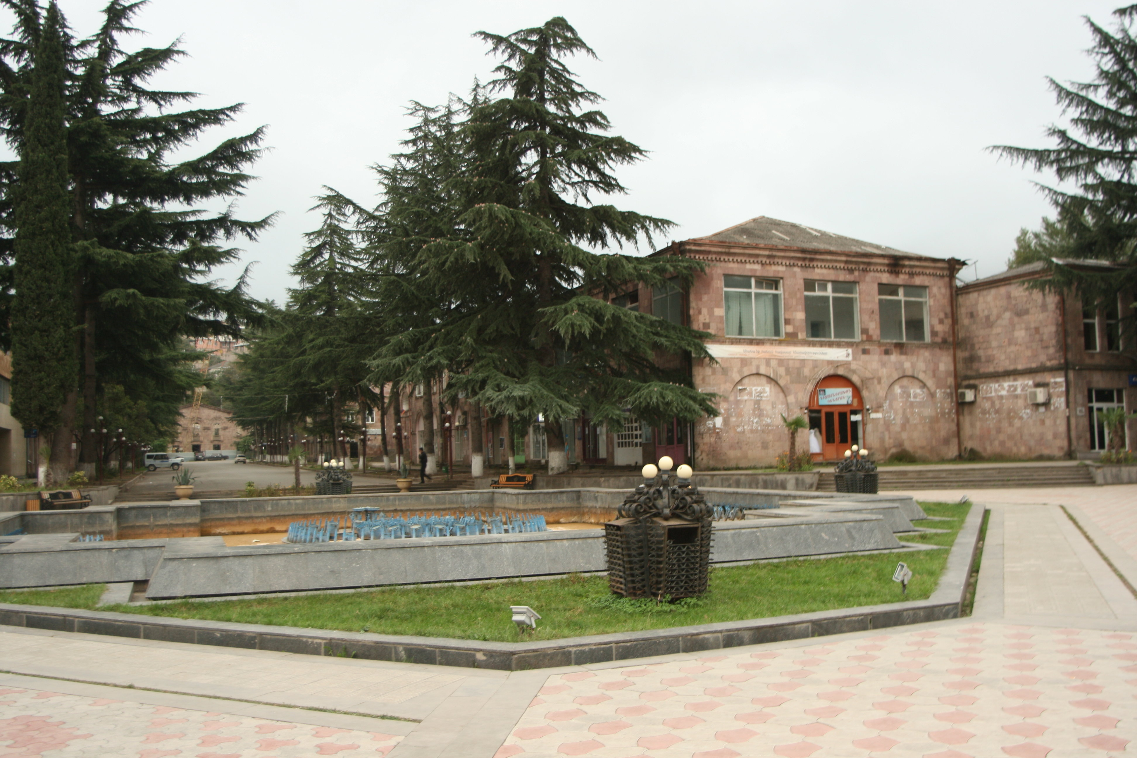 Ijevan, Armenia